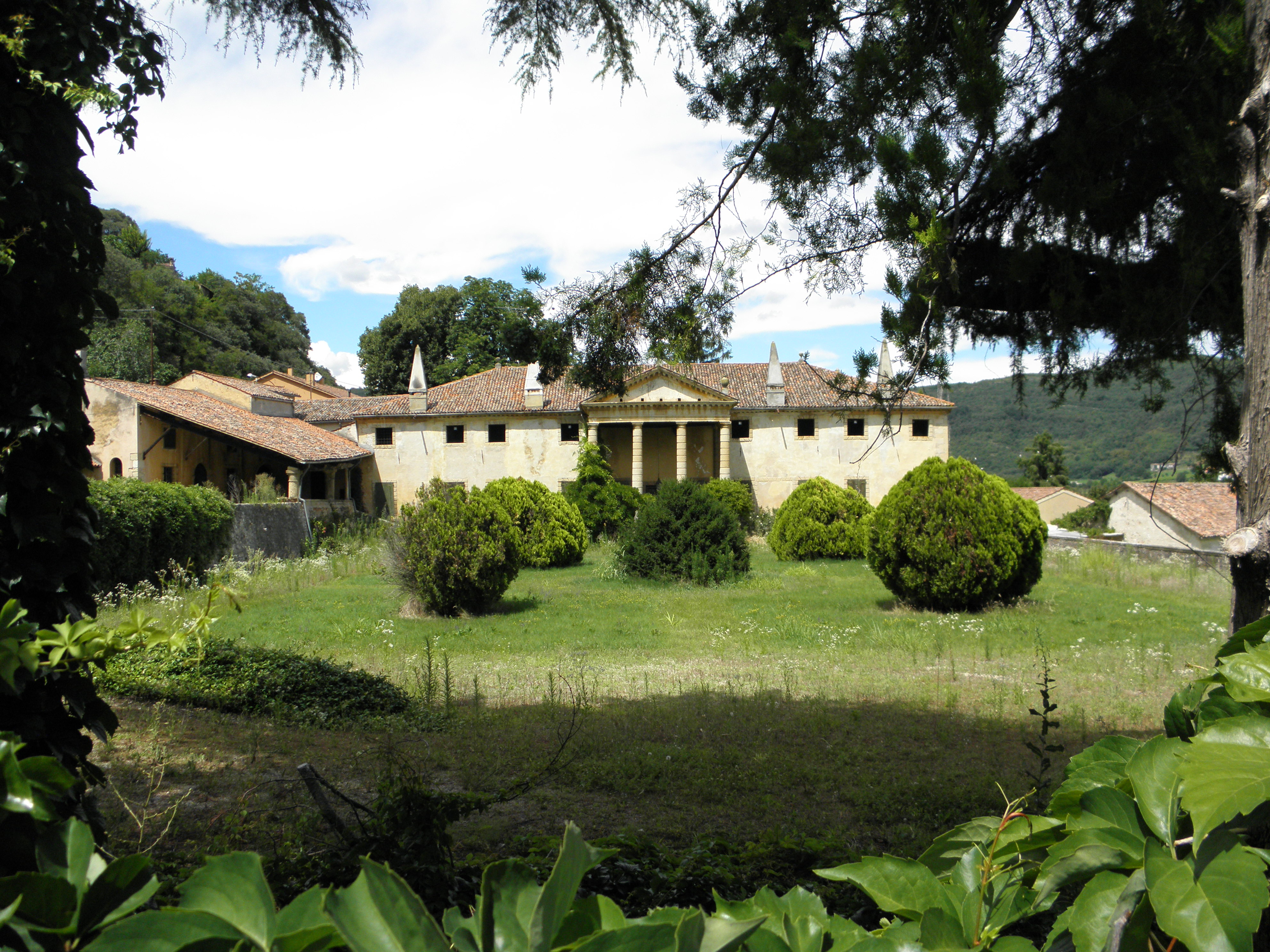 Villa del Ferro, frazione di Val Liona e già frazione di San Germano dei Berici: Villa Priuli Lazzarini.